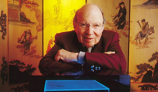 פרופסור לפיזיקה יובל נאמן